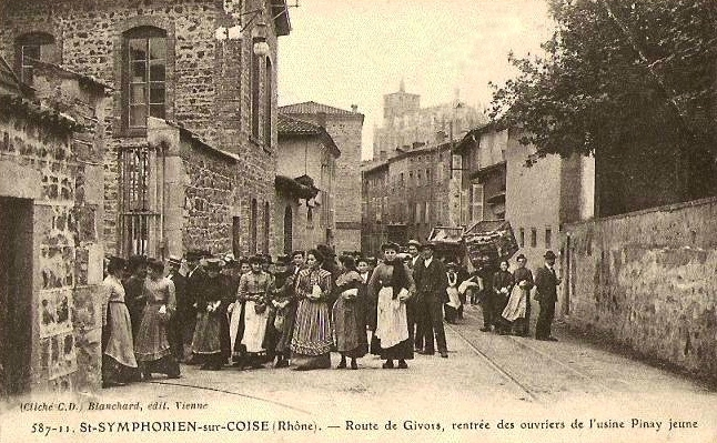 Usine Pinay à Saint-Symphorien-sur-Coise avant 1914, carte postale ancienne.